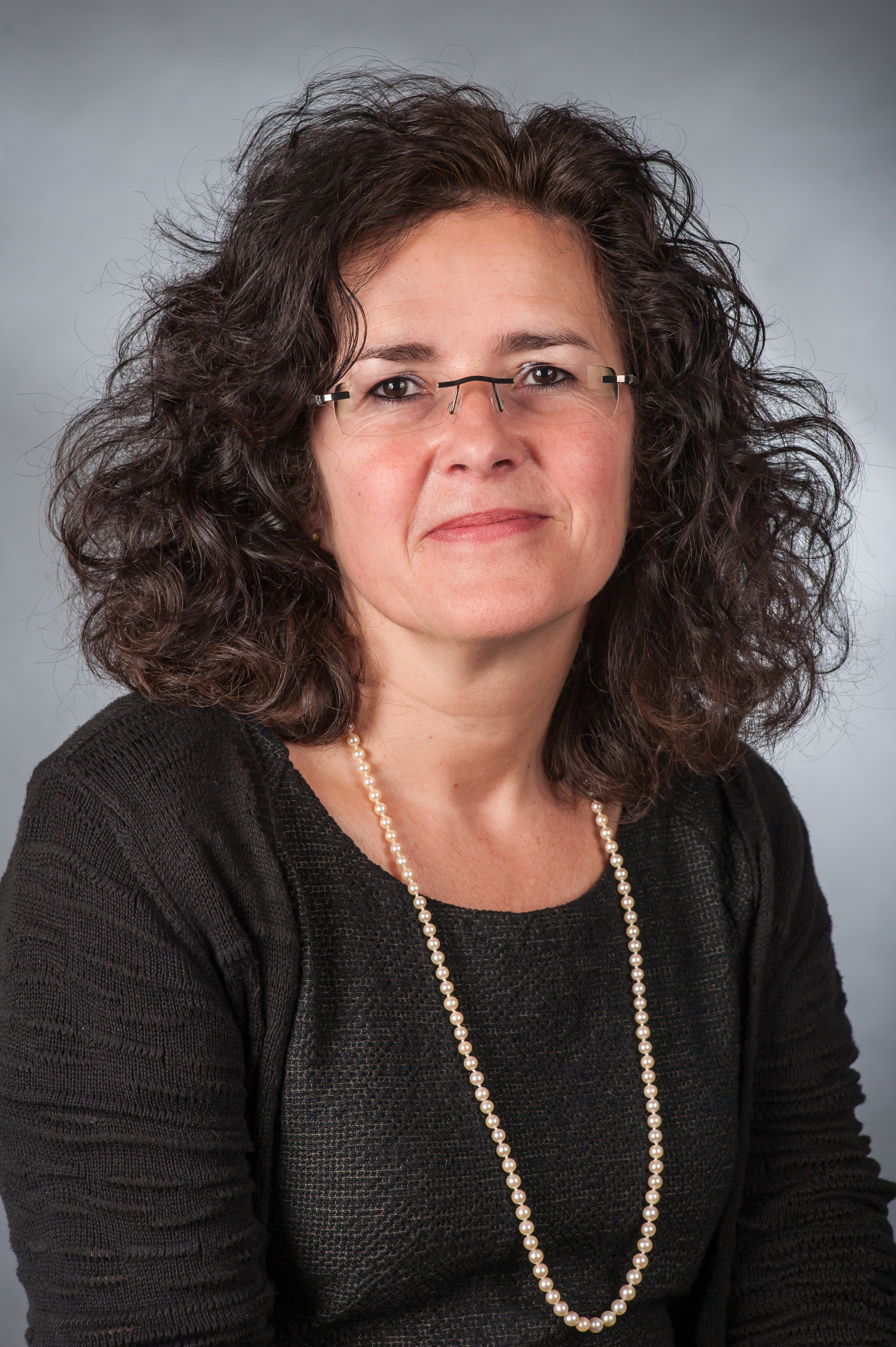 Gabriele Heinen-Kljajic, Mitglied des Niedersächsischen Landtages und Niedersächsische Ministerin für Wissenschaft und Kultur. Wikipedia im Landtag – Niedersachsen 17. bis 18. April 2013 in Hannover Personality rights warningAlthough this work is freely licensed or in the public domain, the person(s) shown may have rights that legally restrict certain re-uses unless those depicted consent to such uses. In these cases, a model release or other evidence of consent could protect you from infringement claims.